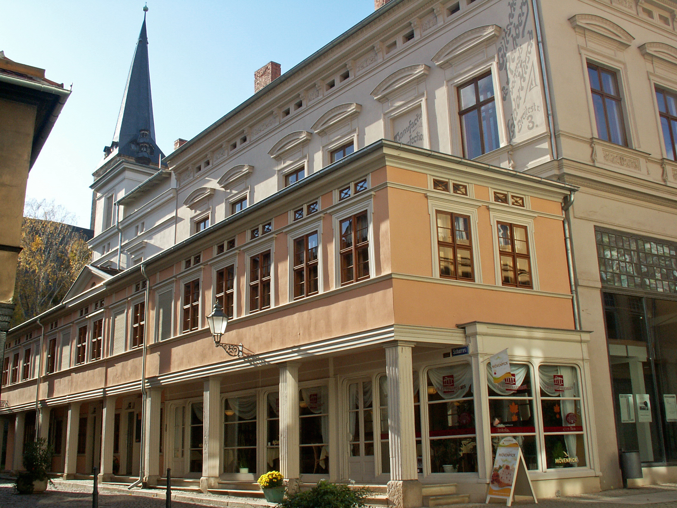 der Scharren in Aschersleben